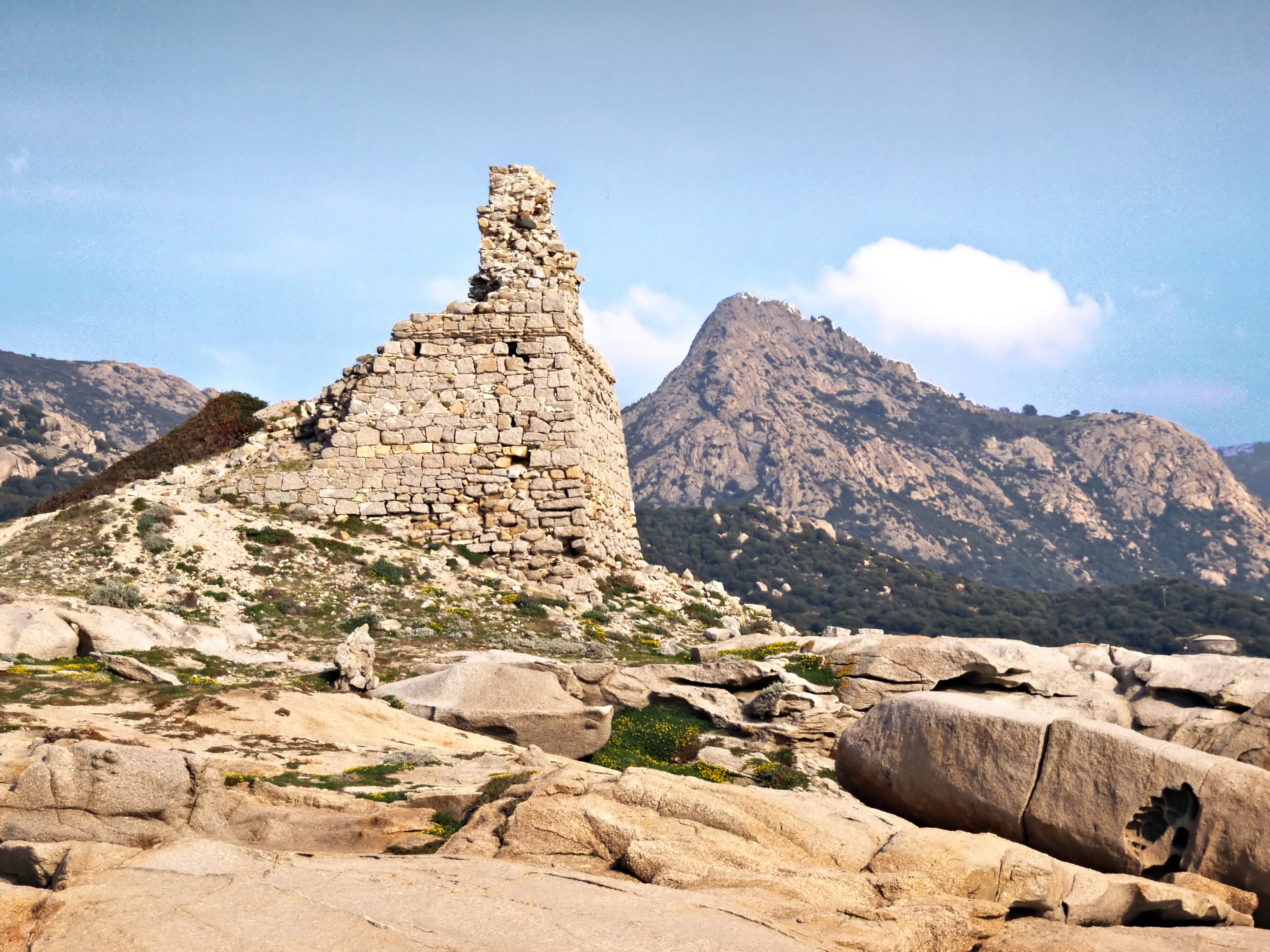 Lumio (Corse) - Tour de Caldanu